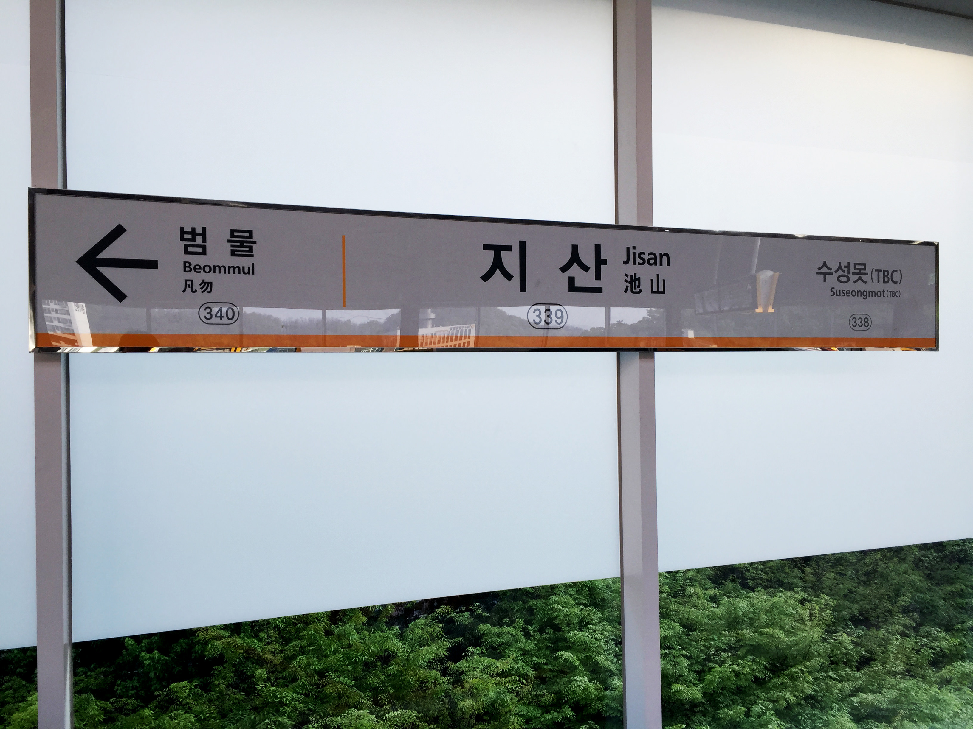 지산역 역명판